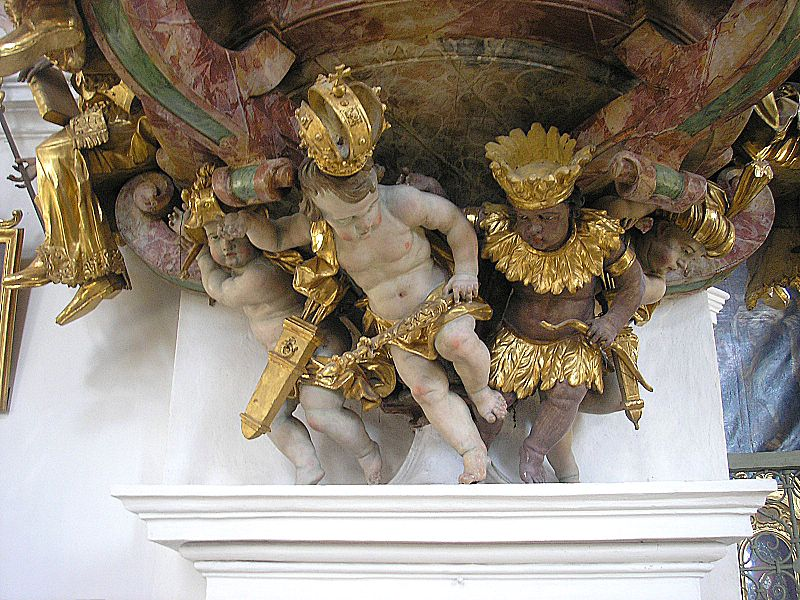 Wallfahrtskirche Maria Hilf (Klosterlechfeld, Landkreis Augsburg, Bayerisch-Schwaben). Amerika, Europa, Afrika und Asien als Kanzelträger. Eigene Aufnahme, Okt. 2006 / Pilgrimage church Klosterlechfeld near Landsberg am Lech, Bavaria, Germany. America, Europe, Africa and Asia holding the pulpit. Own photo, Oct. 2006